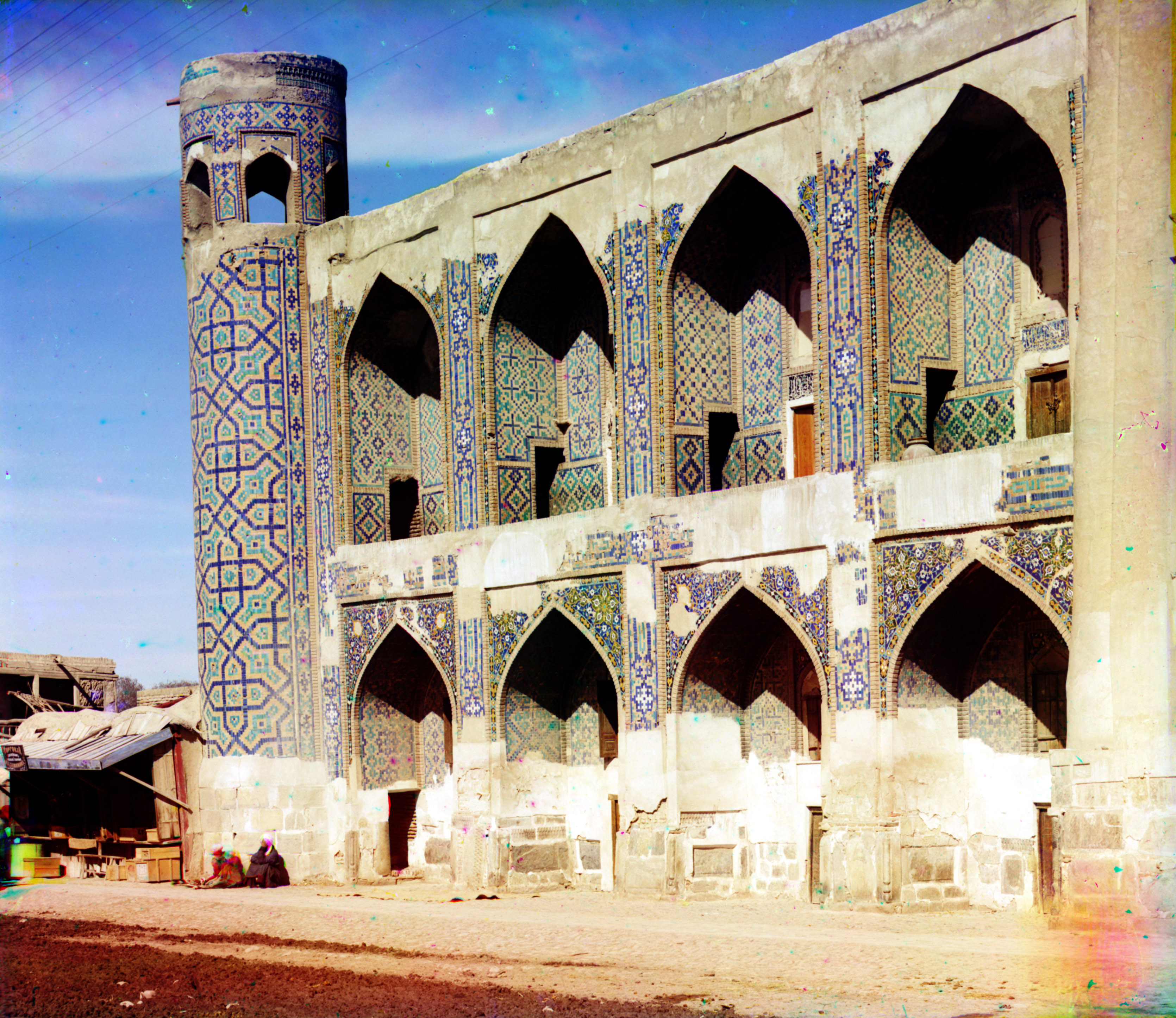 Тилля-Кари с площади Регистана